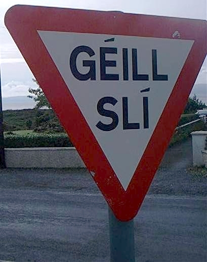 Vorfahrt Achten Schild in Irland